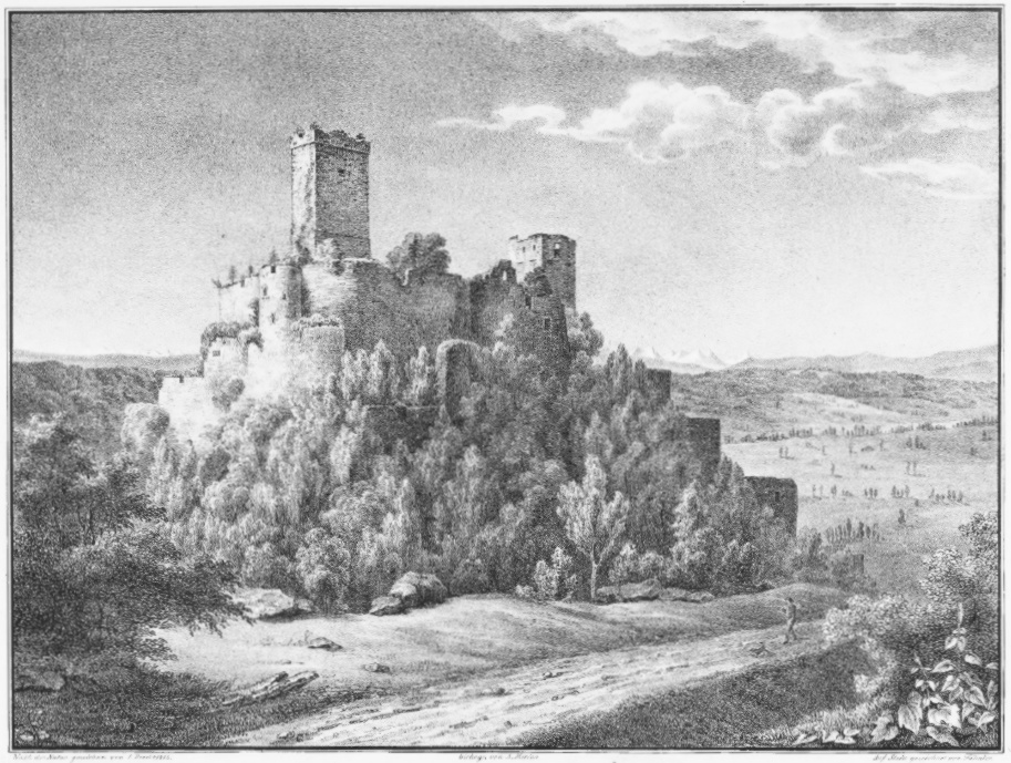 Burgruine Rötteln bei Lörrach - Ansicht von Norden